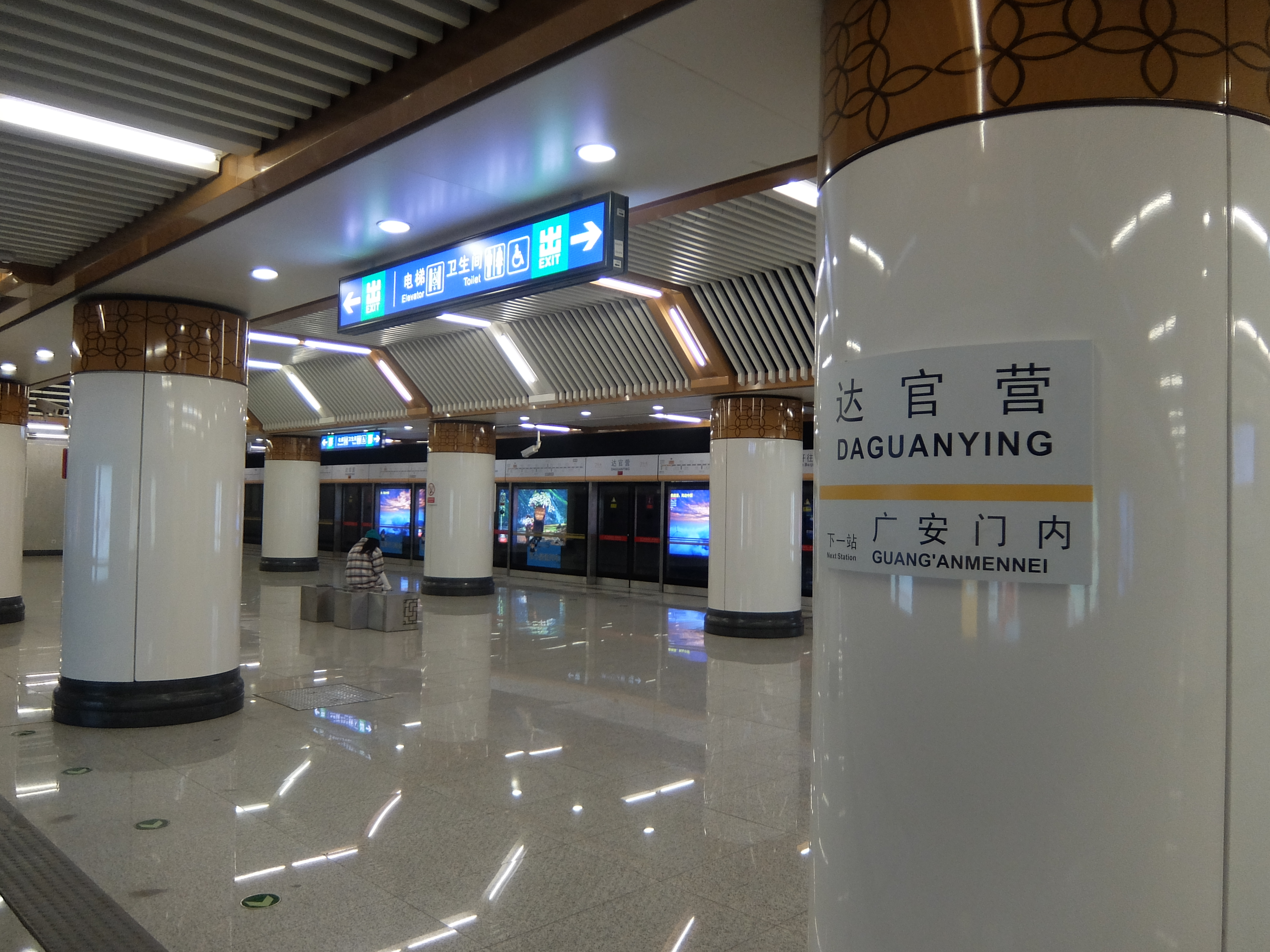 北京地铁7号线达官营站站台